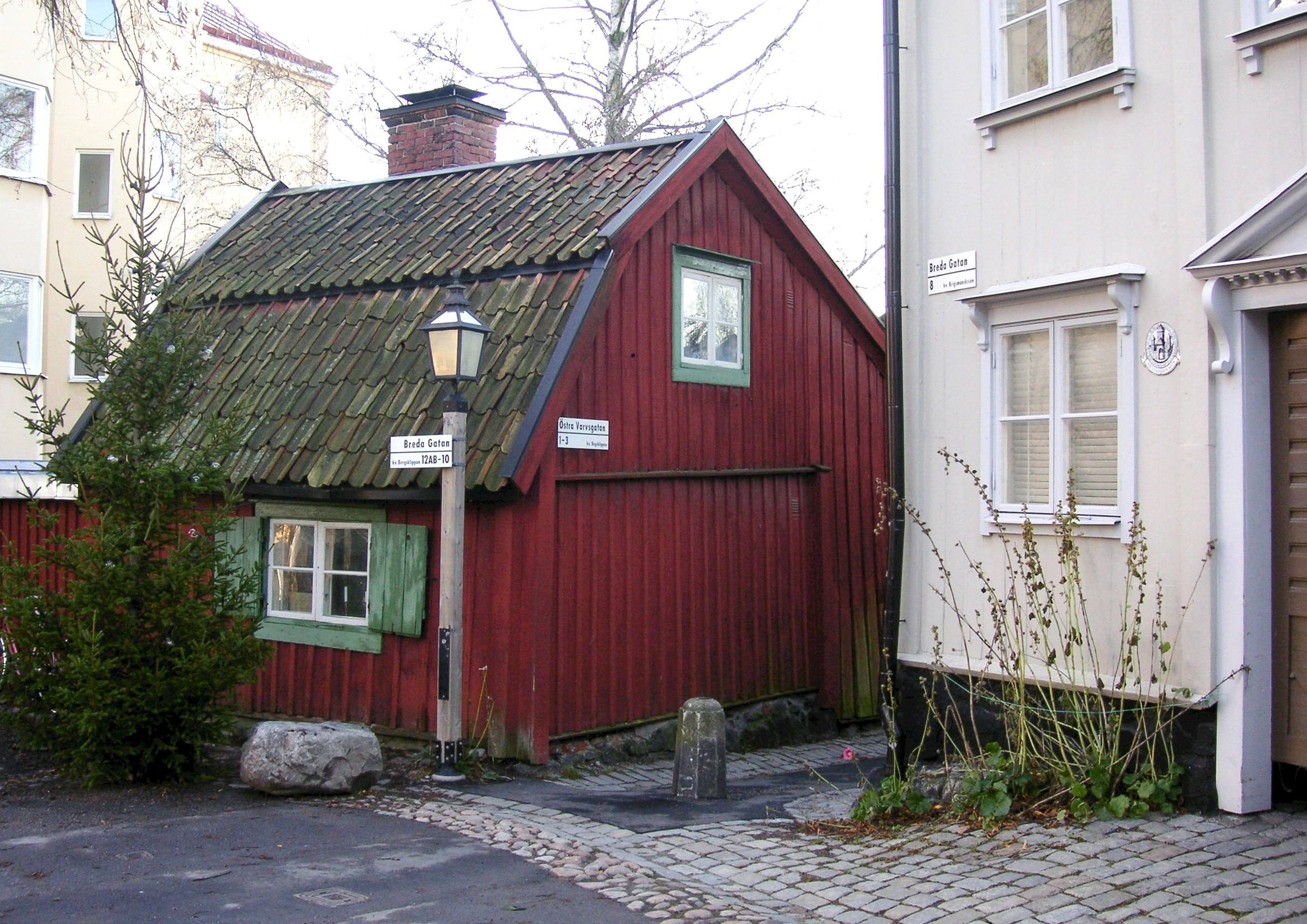 Djurgårdsstaden, Stockholm